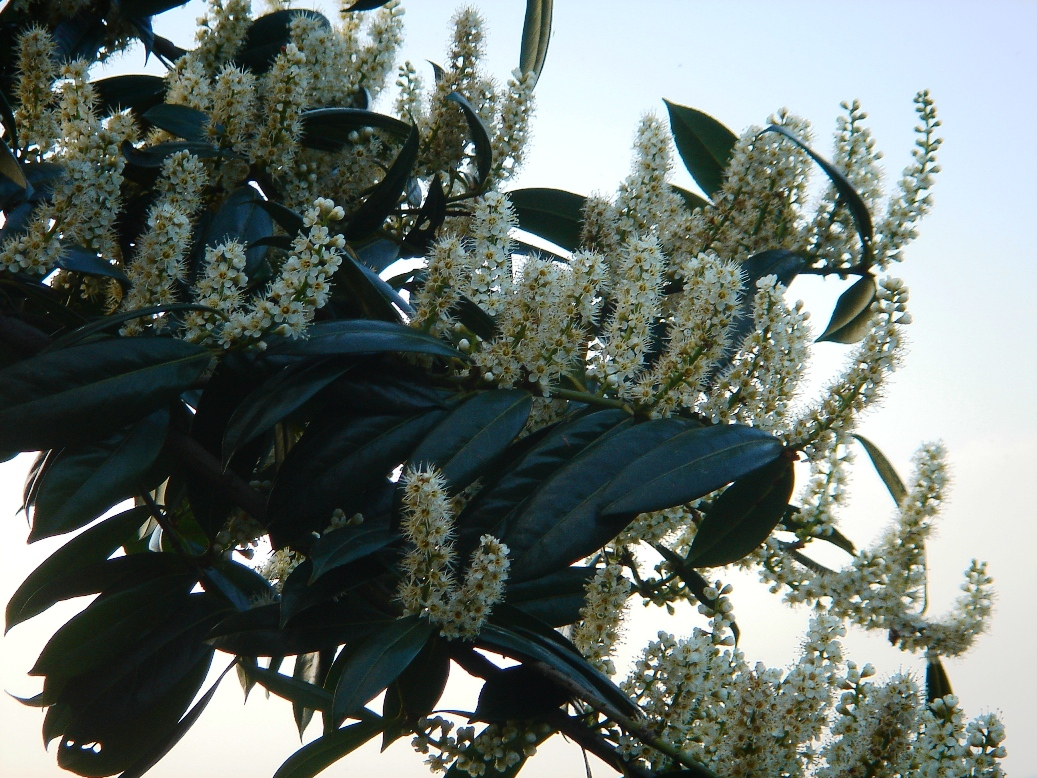 Prunus laurocerasus